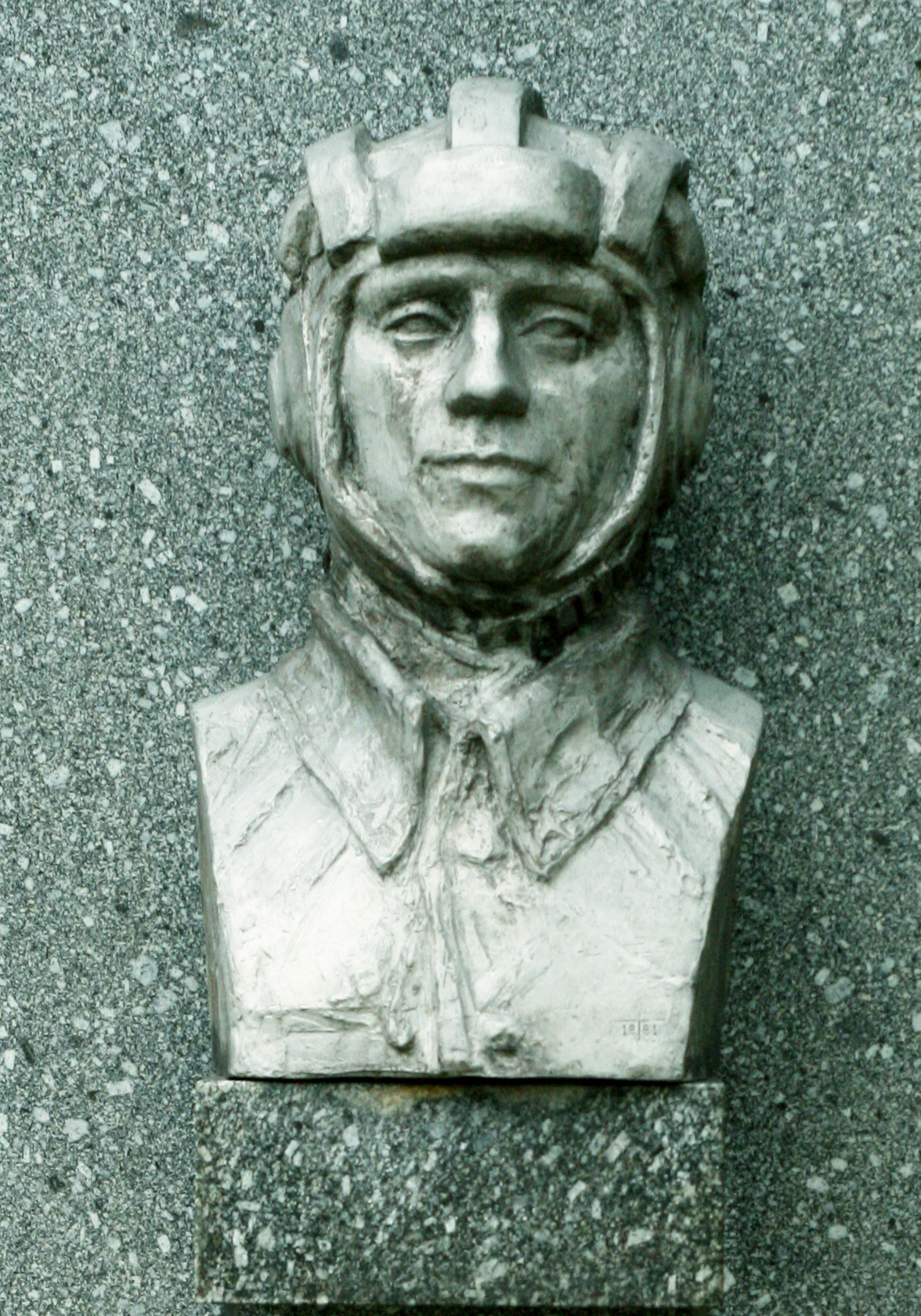 Dukla, Alej hrdinov kapitán František Vrána